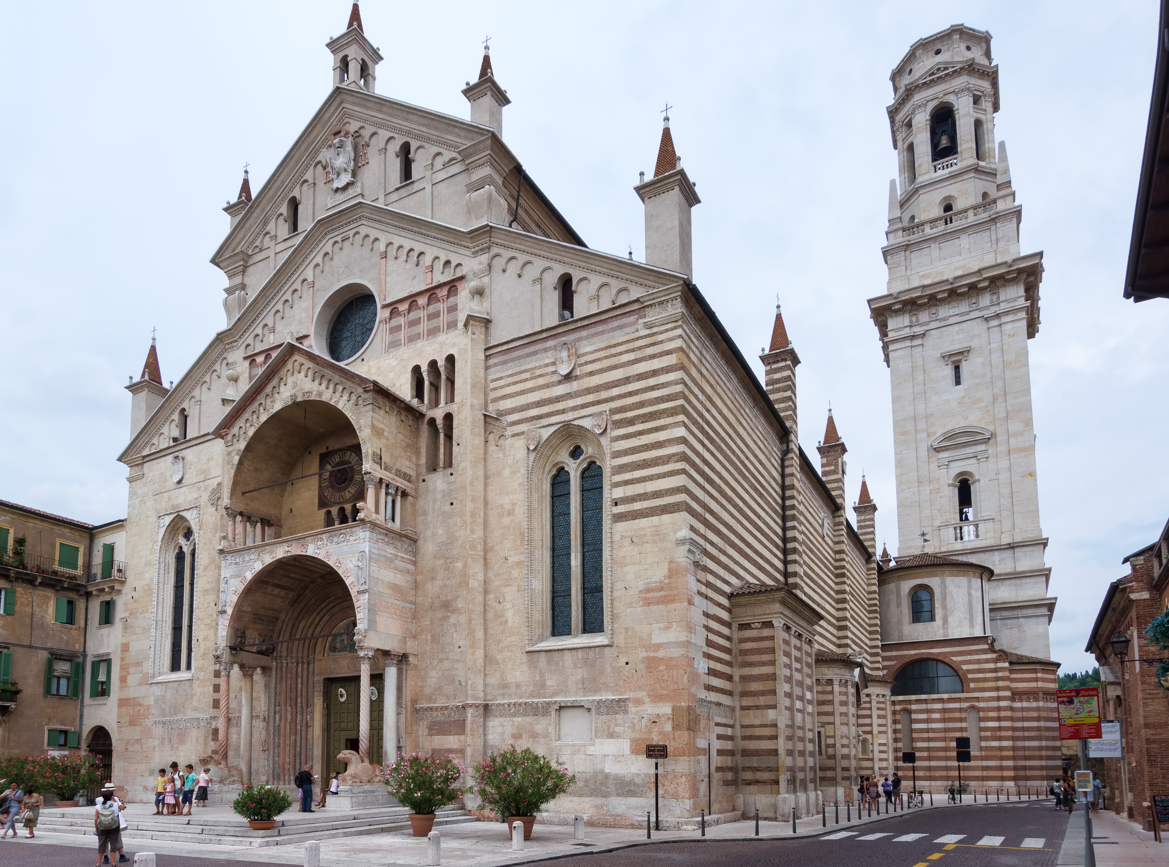 Vérone - Cathédrale Santa Maria Matricolare - Vue générale